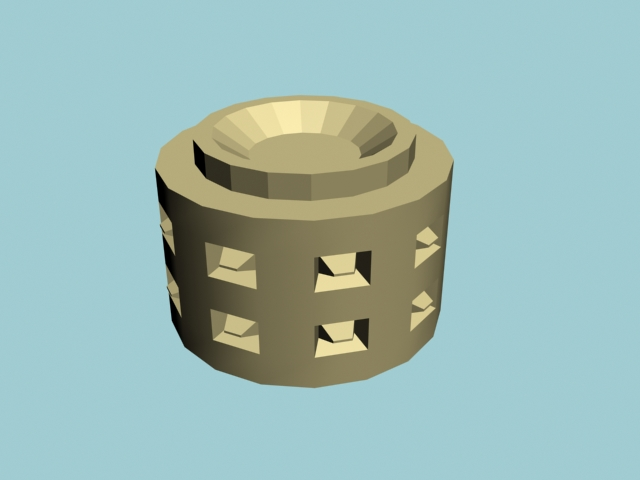 Silinder pärast tahkudega mängimist